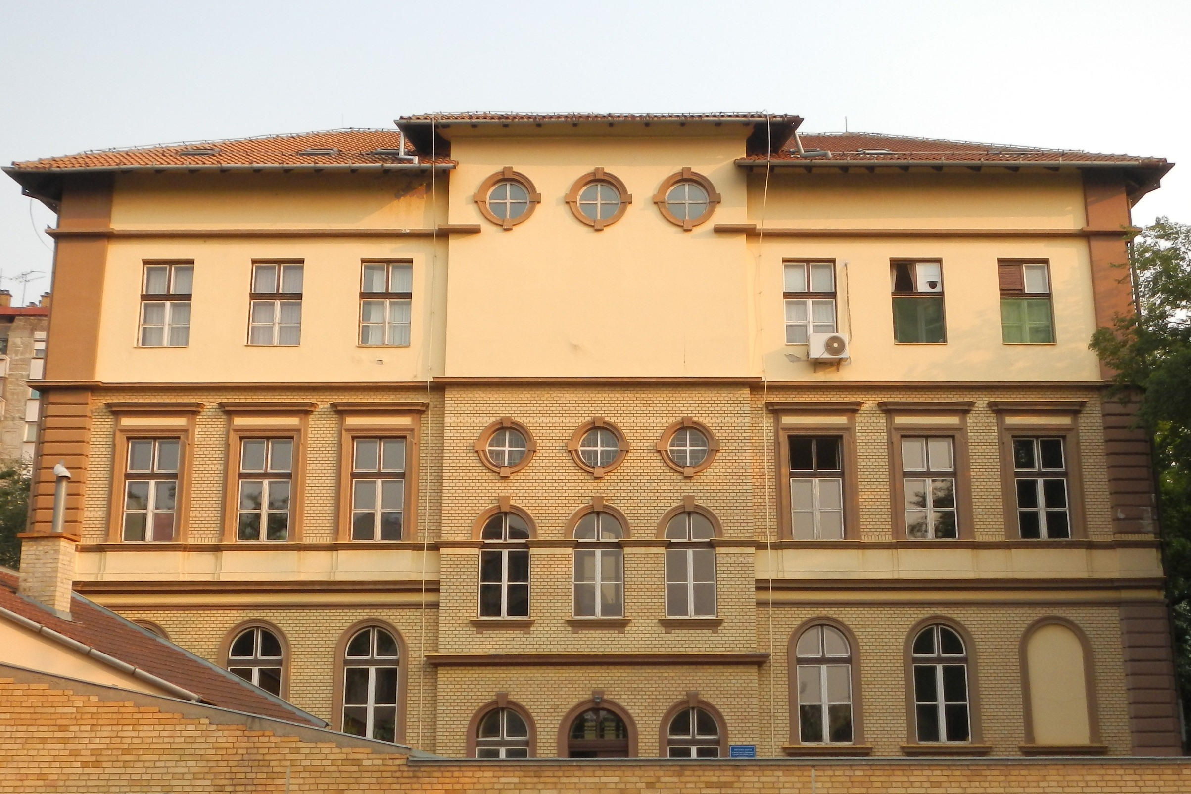 Школски центар за васпитање и образовање слушно оштећених лица, Суботица